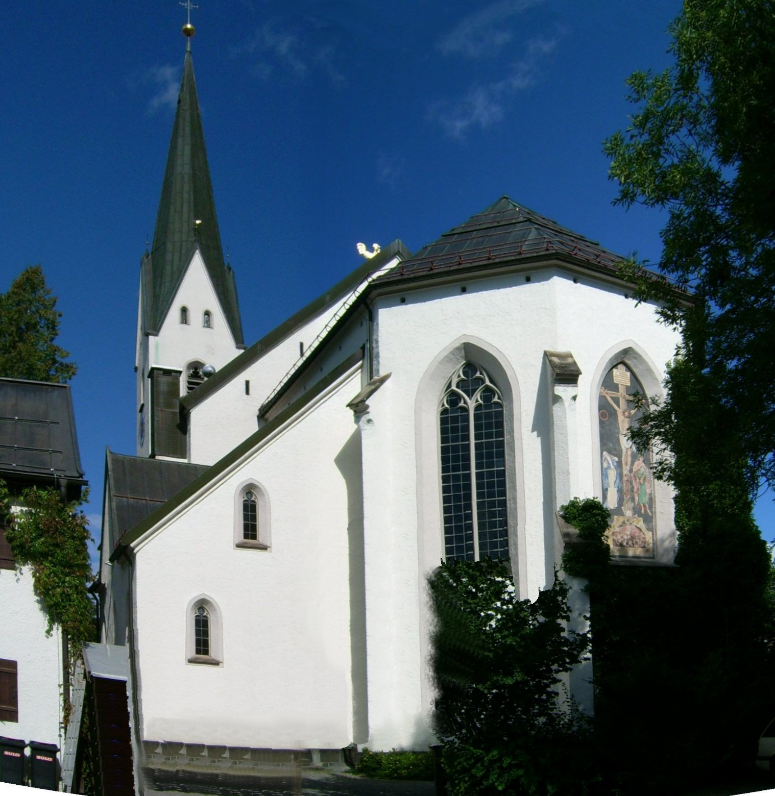 Pfarrkirche St. Johann in Oberstdorf